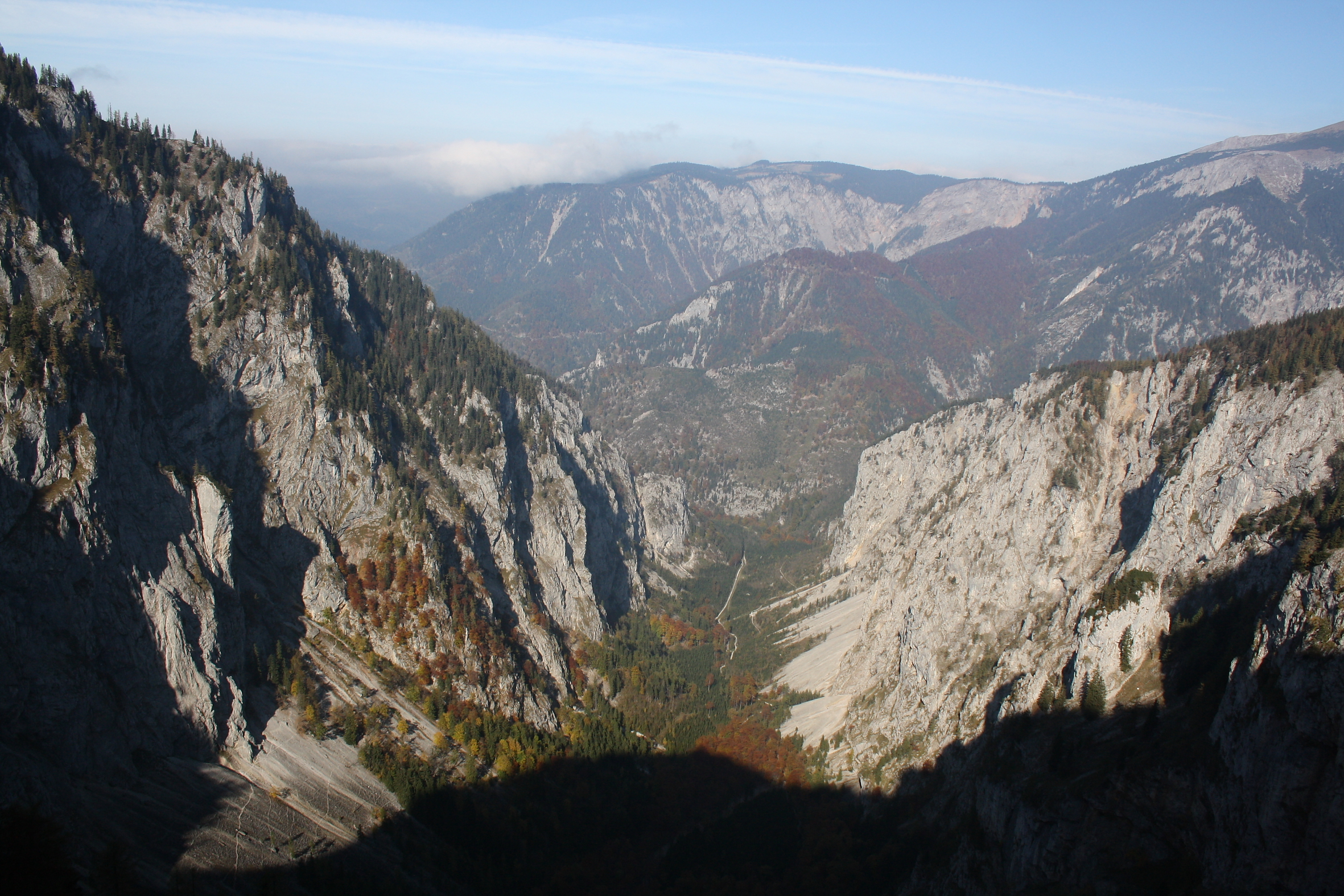 Blick vom Alpenvereinssteig in Richtung Talausgang des Großen Höllentals. Im Hintergrund der westliche Teil des Schneebergmassivs.